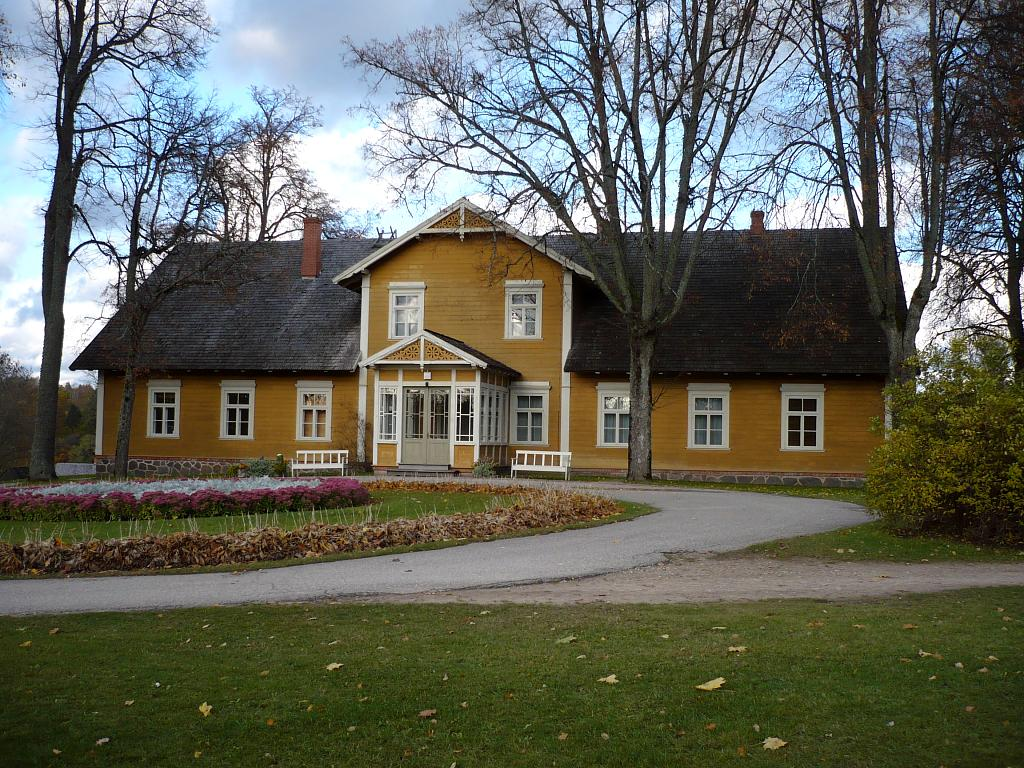 Turaidas muiža 2008-10-18